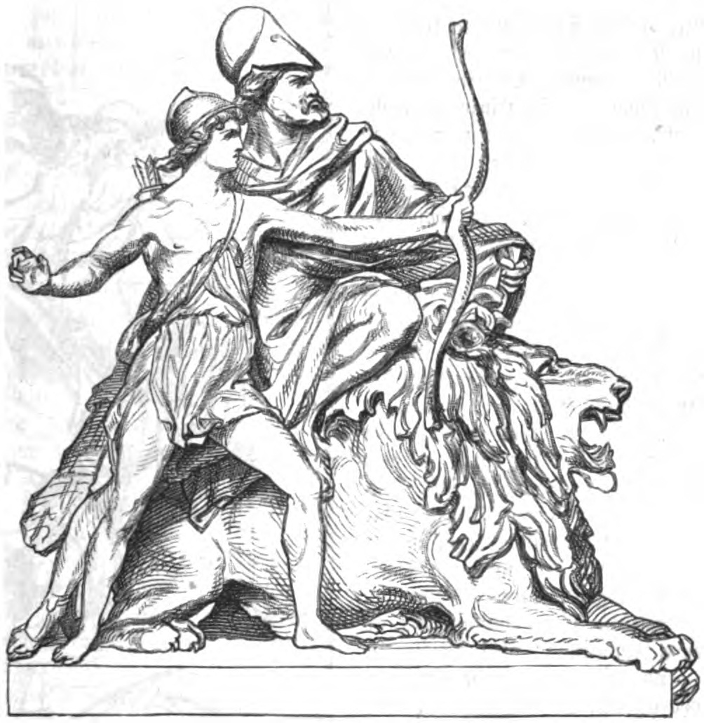 Kämpfergruppe. Werk des deutschen Bildhauers August Fischer.